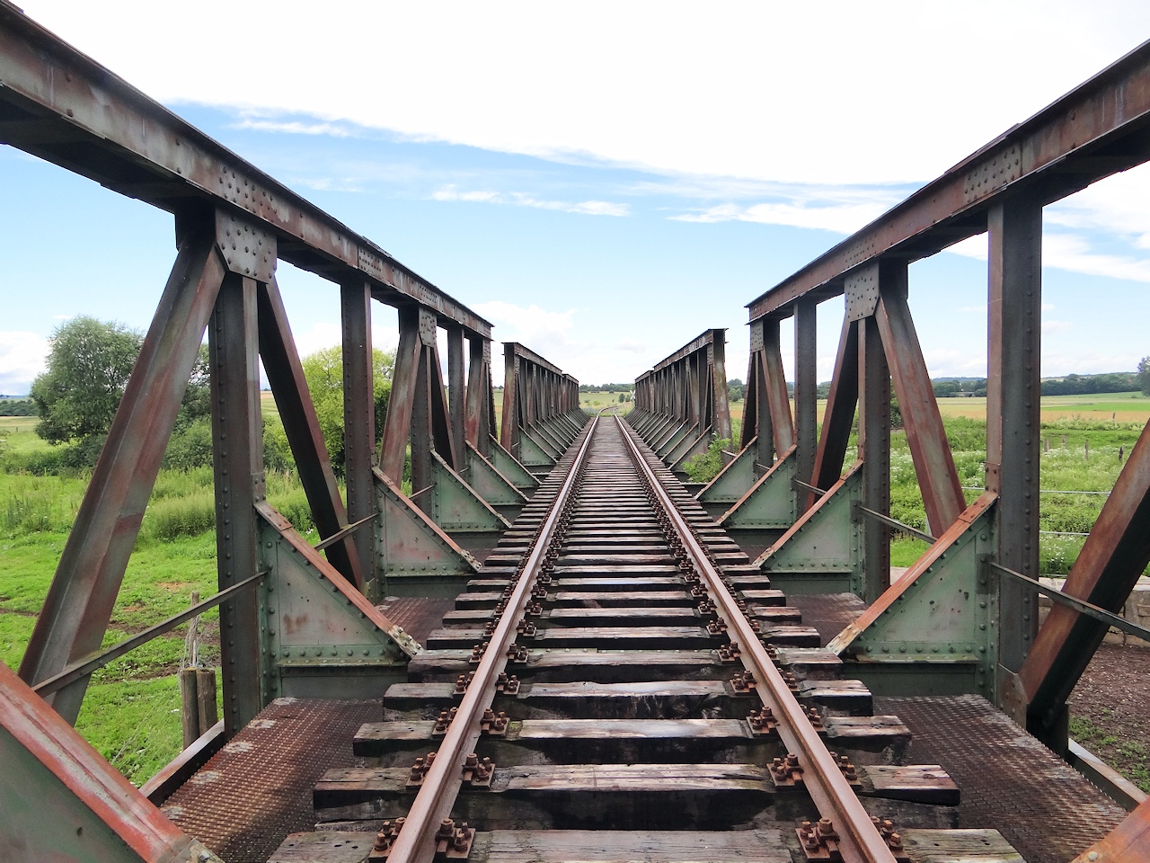 Eisenbahnbrücke über die Oker bei Börßum für die Warnetalbahn, Blickrichtung Westen.